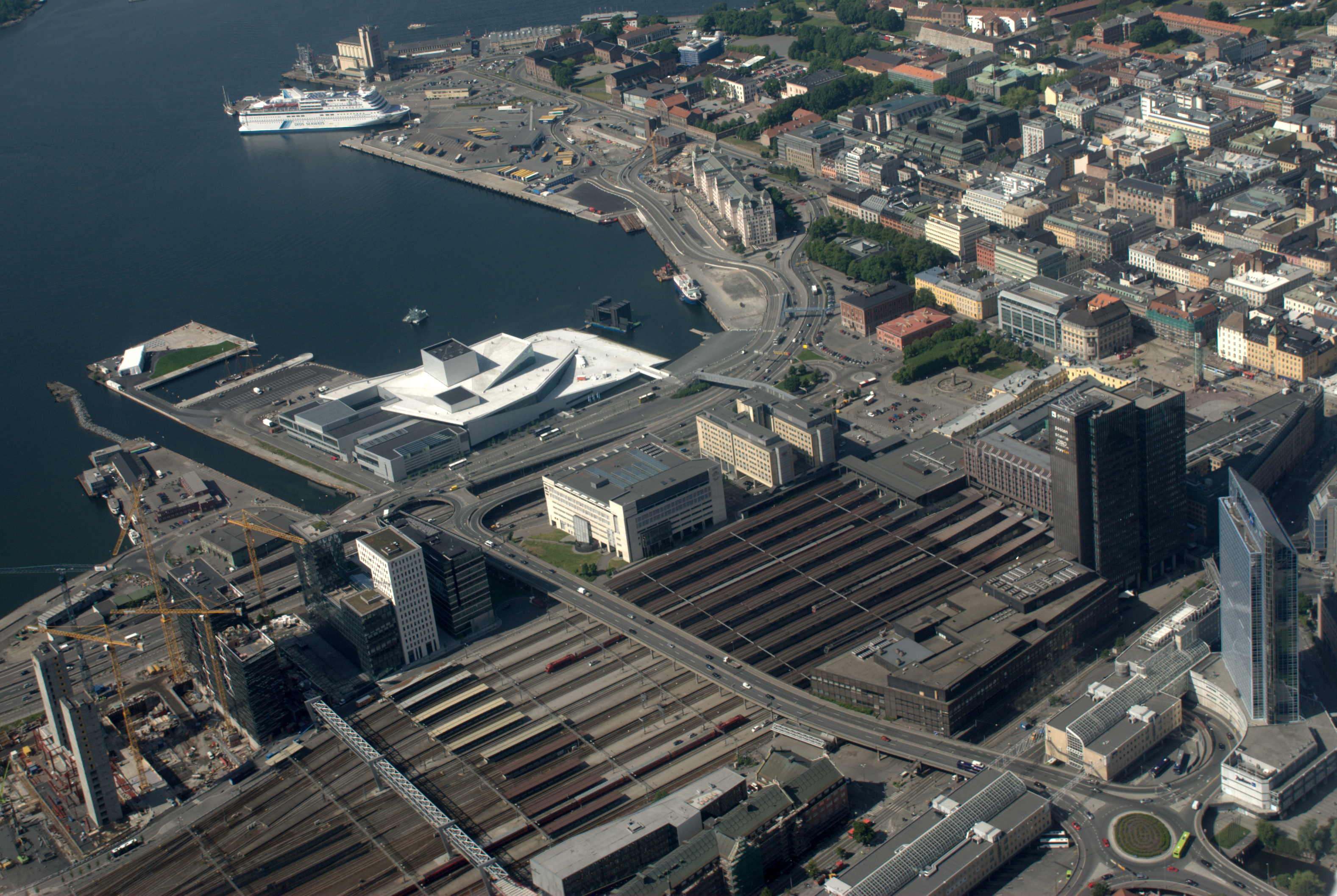 Oslo Sentralstasjon